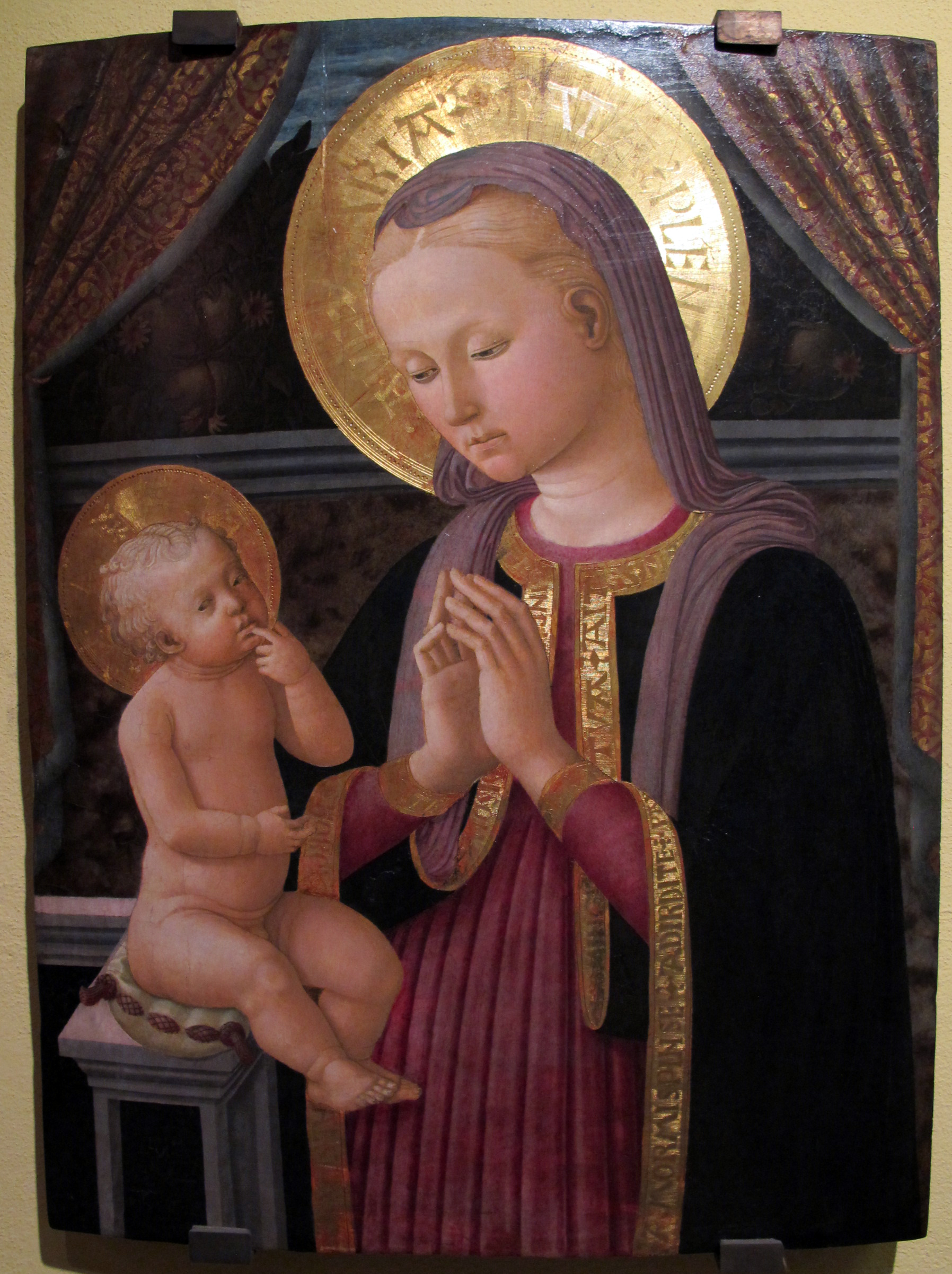 Zanobi machiavelli, madonna in adorazione del bambino, 1460-170 circa